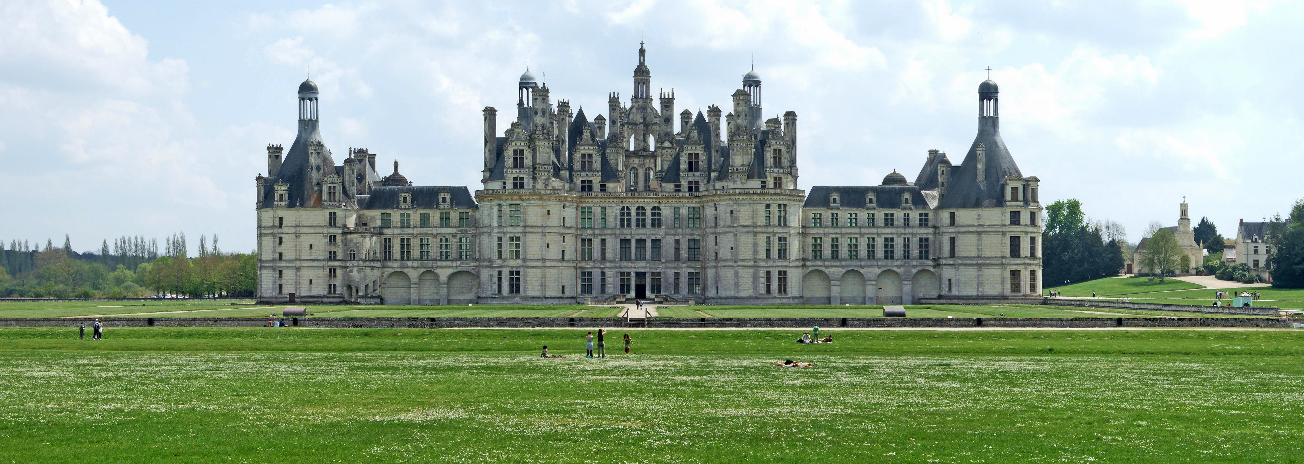 Panorama of Château de Chambord, France.